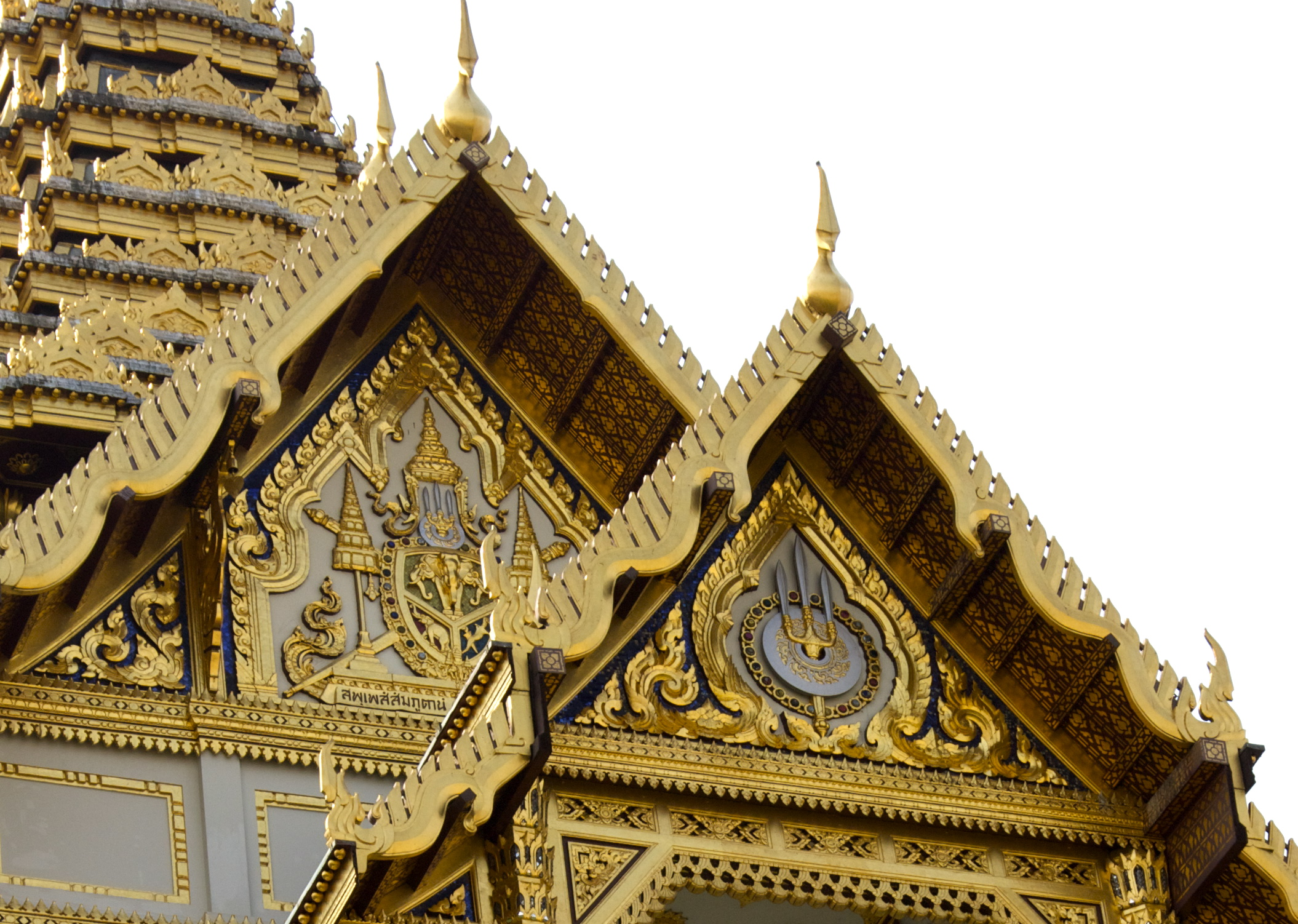 Chakri Mahaprasat Front, Grand Palace, Bangkok, Thailand